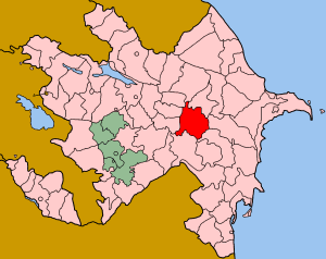 Map of Azerbaijan showing Kurdamir (Kürdəmir) rayon.